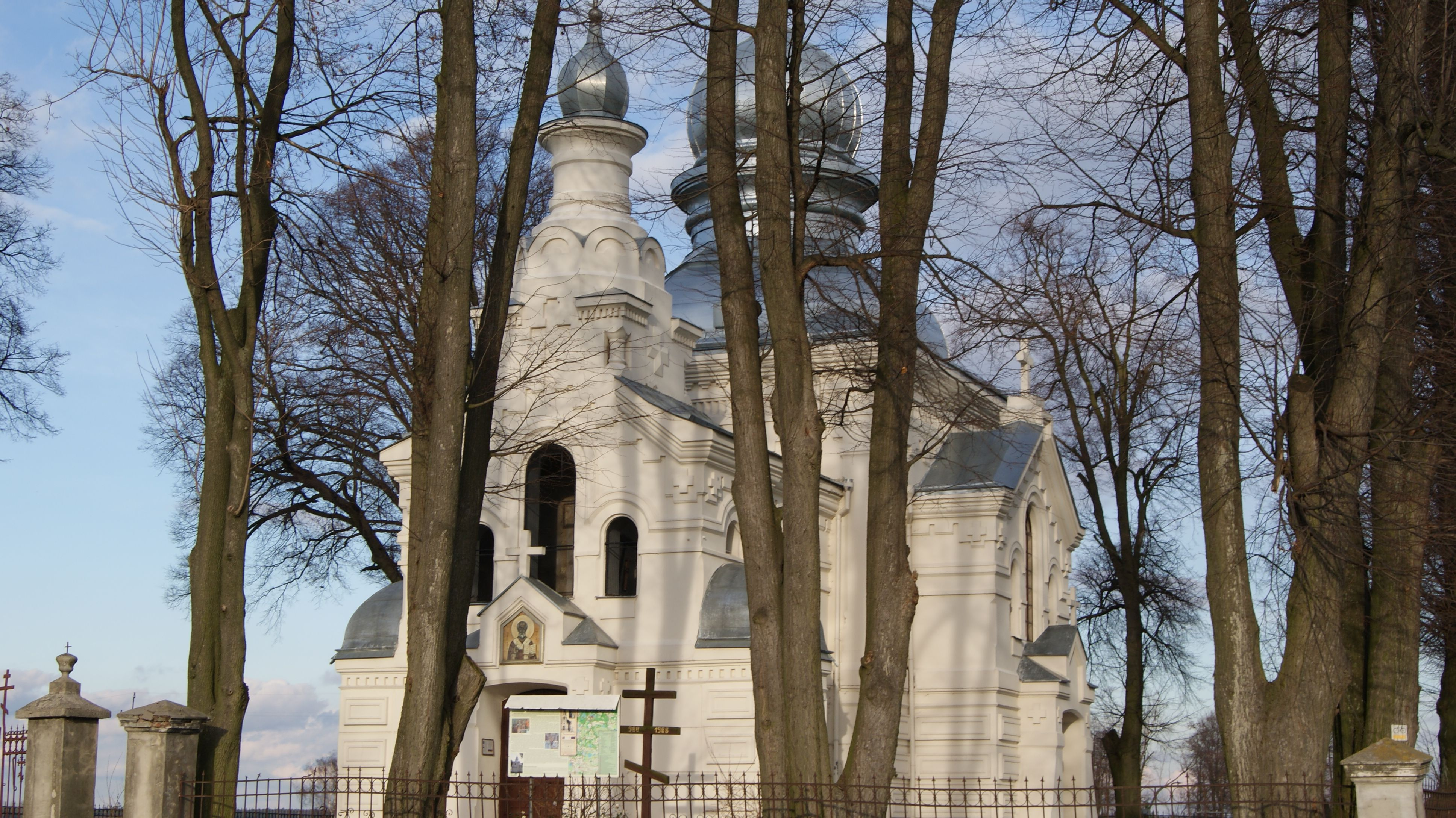 Zespół cerkwi prawosławnej: - cerkiew prawosławna p.w. św. Mikołaja Dratów